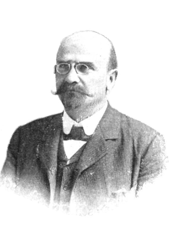 Ludovic Mrazec